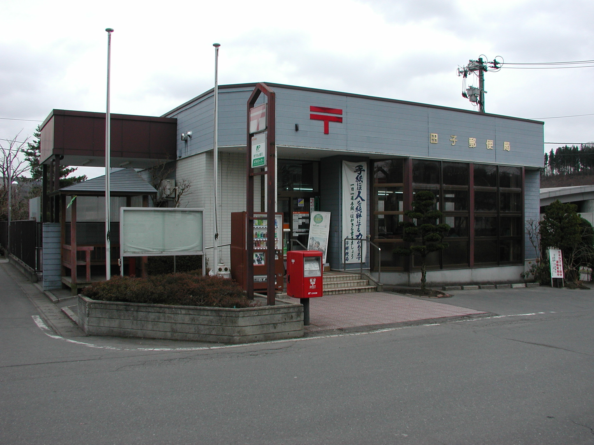 田子郵便局 郵便事業八戸西支店田子集配センター併設